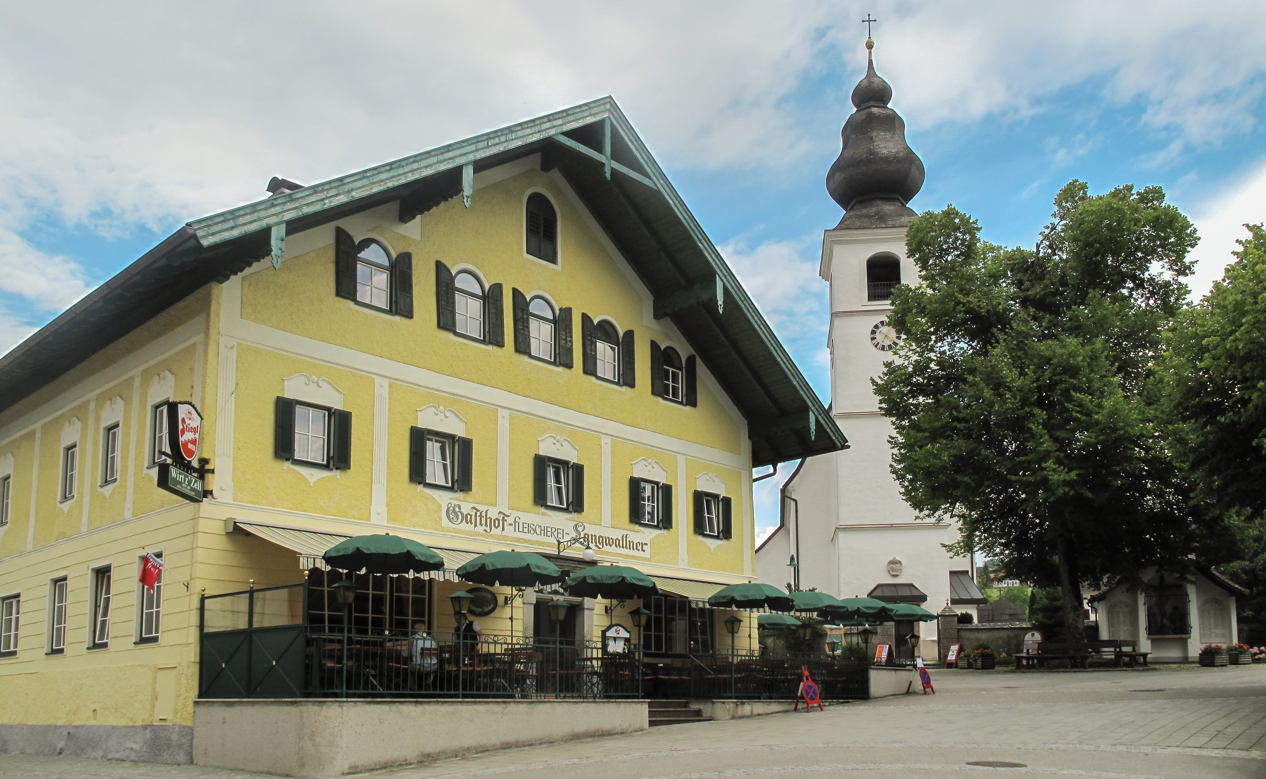 Zell am Moos, kerk en Gasthof